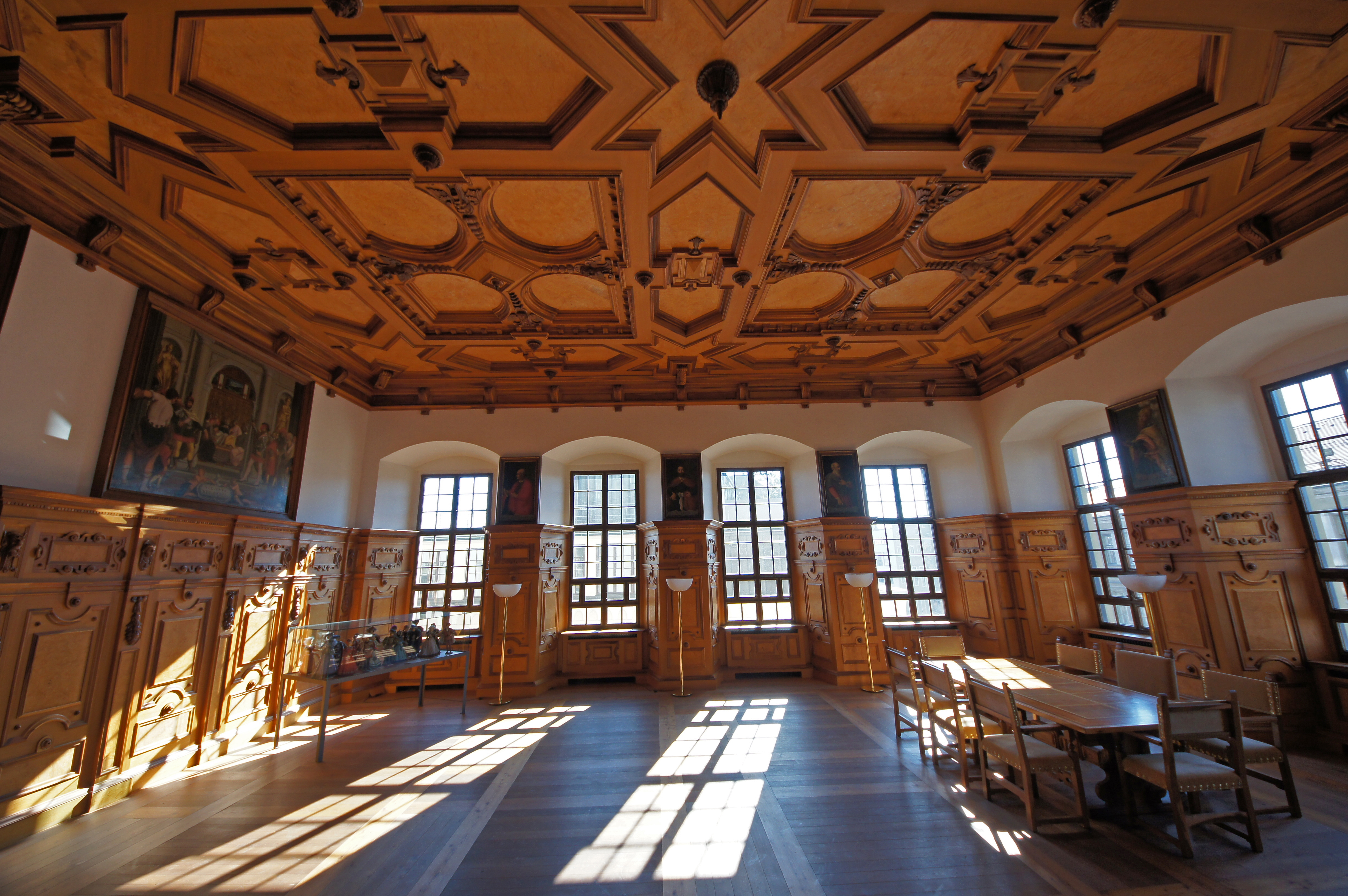 2011-02-26 Augsburg 013 Rathaus, Goldener Saal